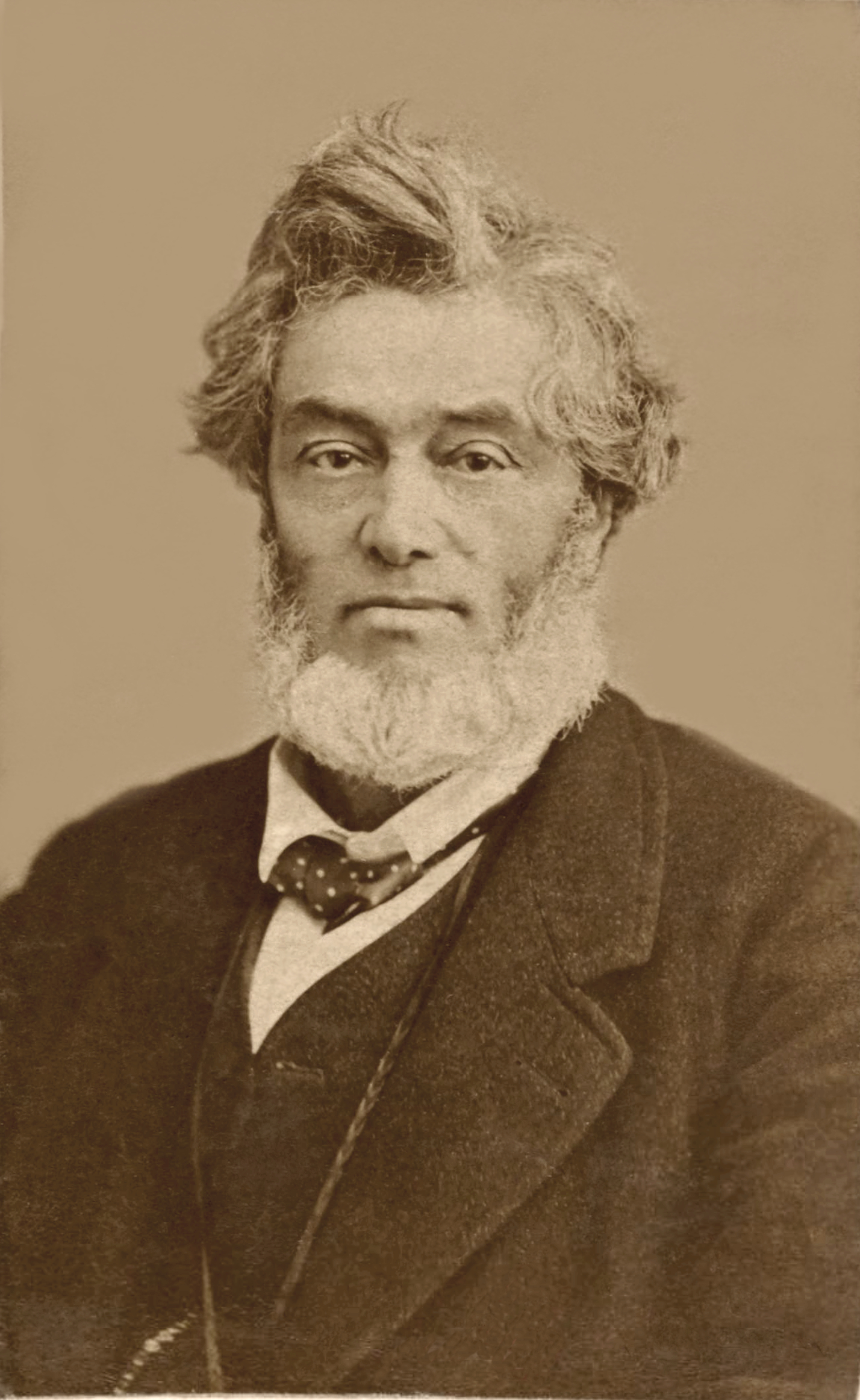 Jules Favre (1809 - 1880).